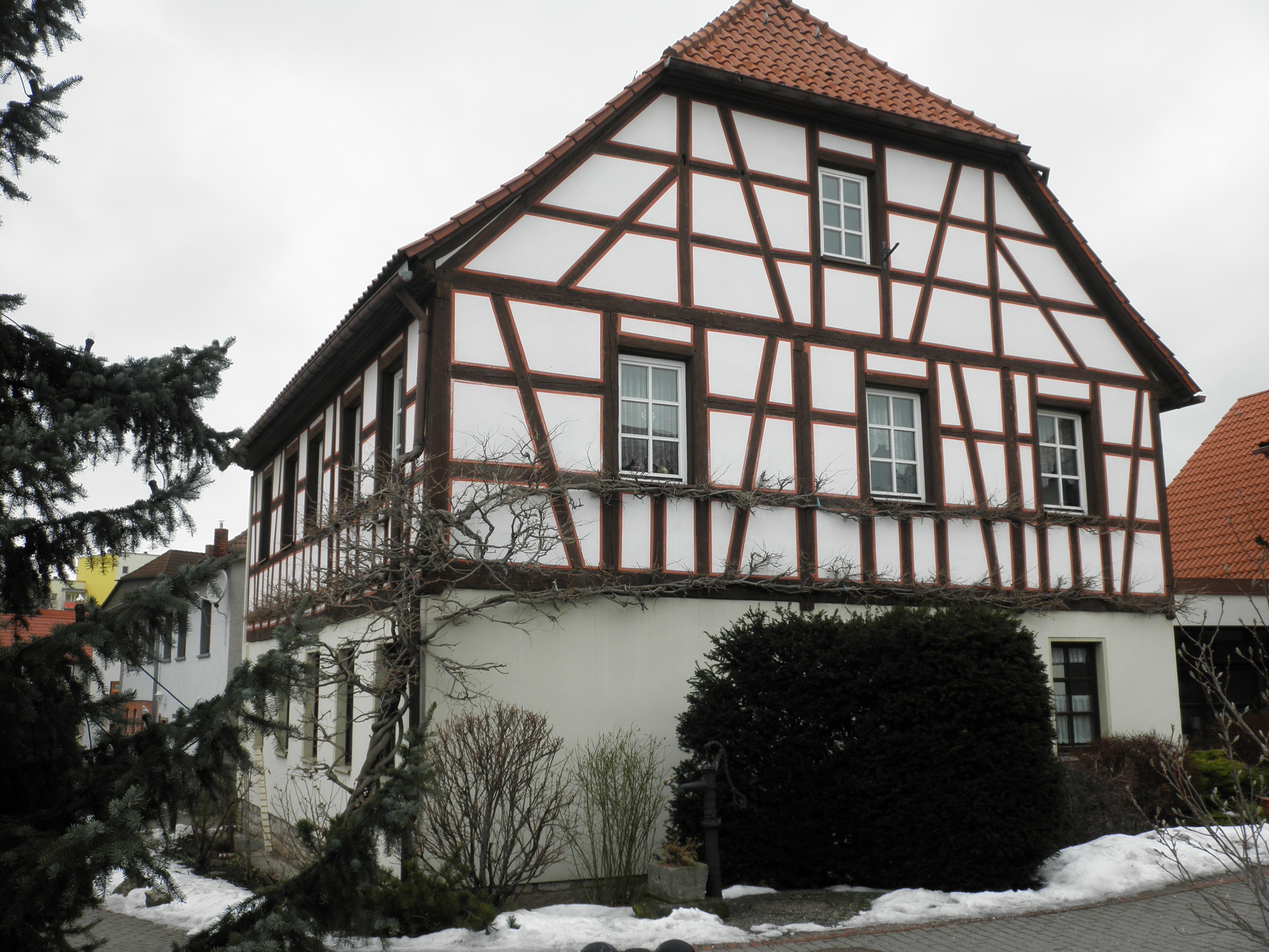 Pfarrhaus der Katholischen Gemeinde